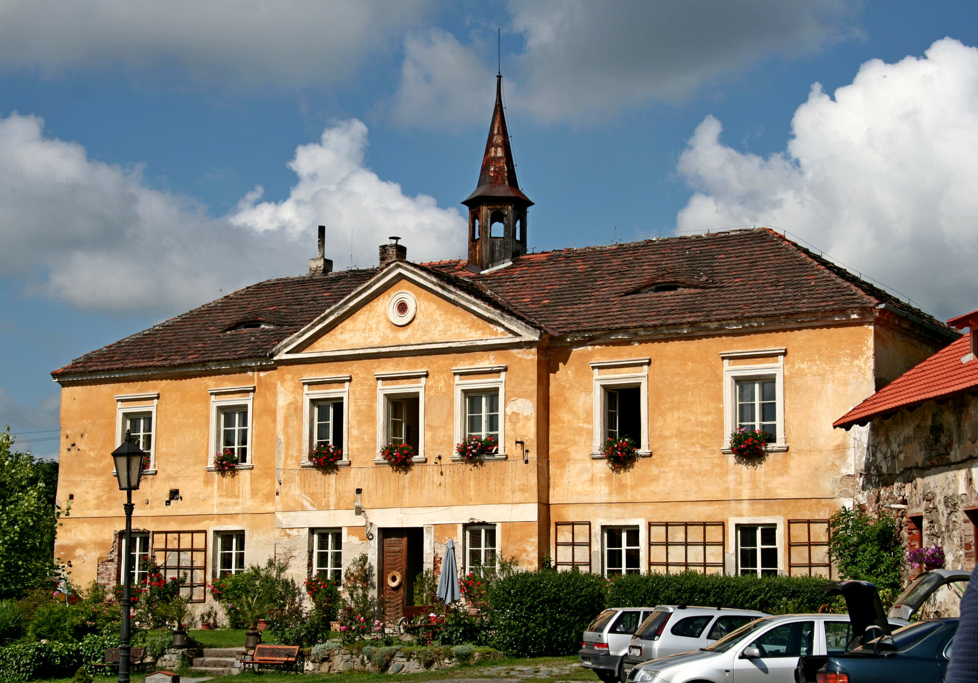 Zámek Vysoká Lhota, Vysoká Lhota 1, Vysoká Lhota (Čerčany).